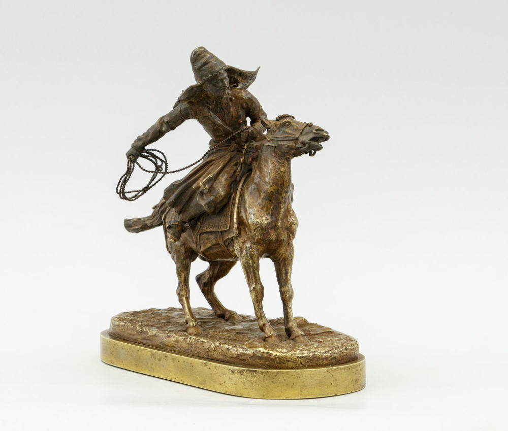 Скульптурная композиция "Башкир-табунщик" . Е. Лансере. 1879